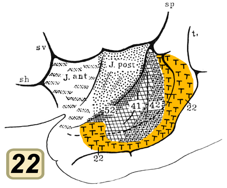 Brodmann area 22